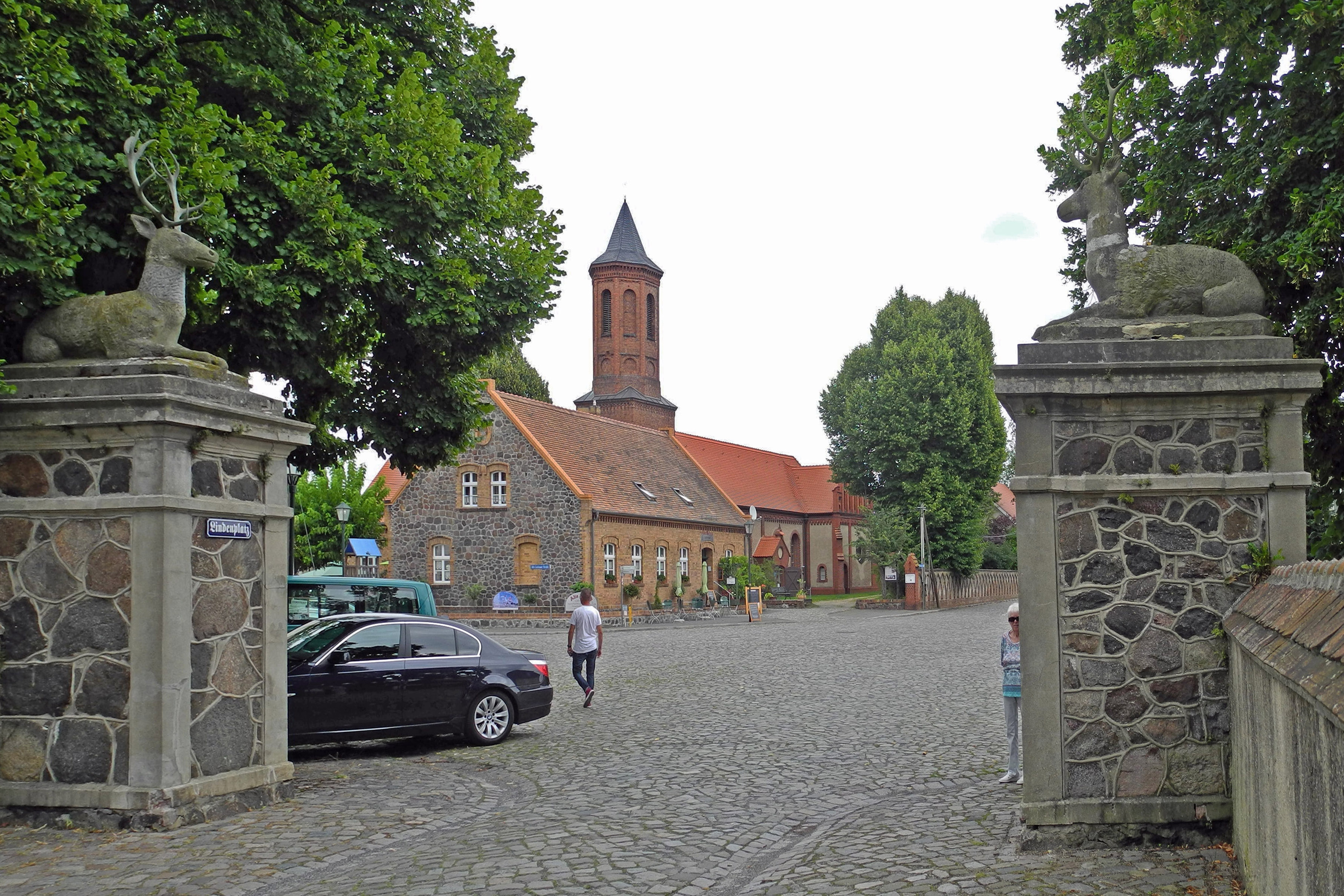 Blick vom Lindenplatz zur alten Dorfschule von Fürstlich Drehna, Marktplatz 1